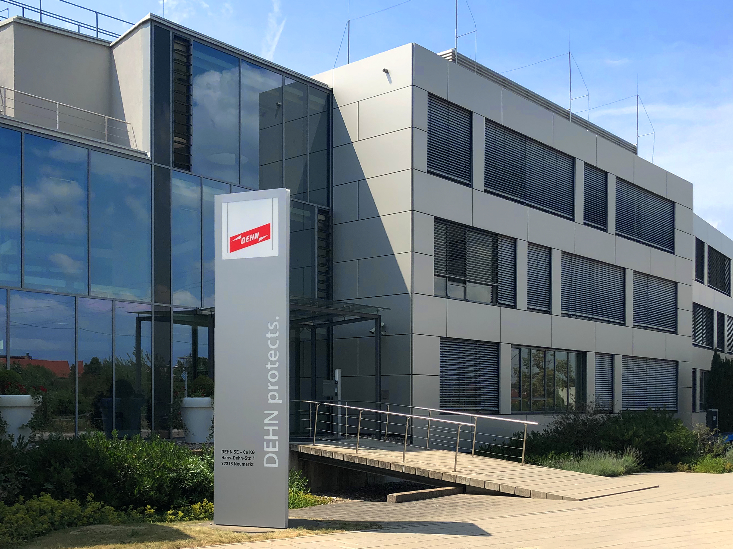 Haupteingang DEHN + SÖHNE, Deutschland